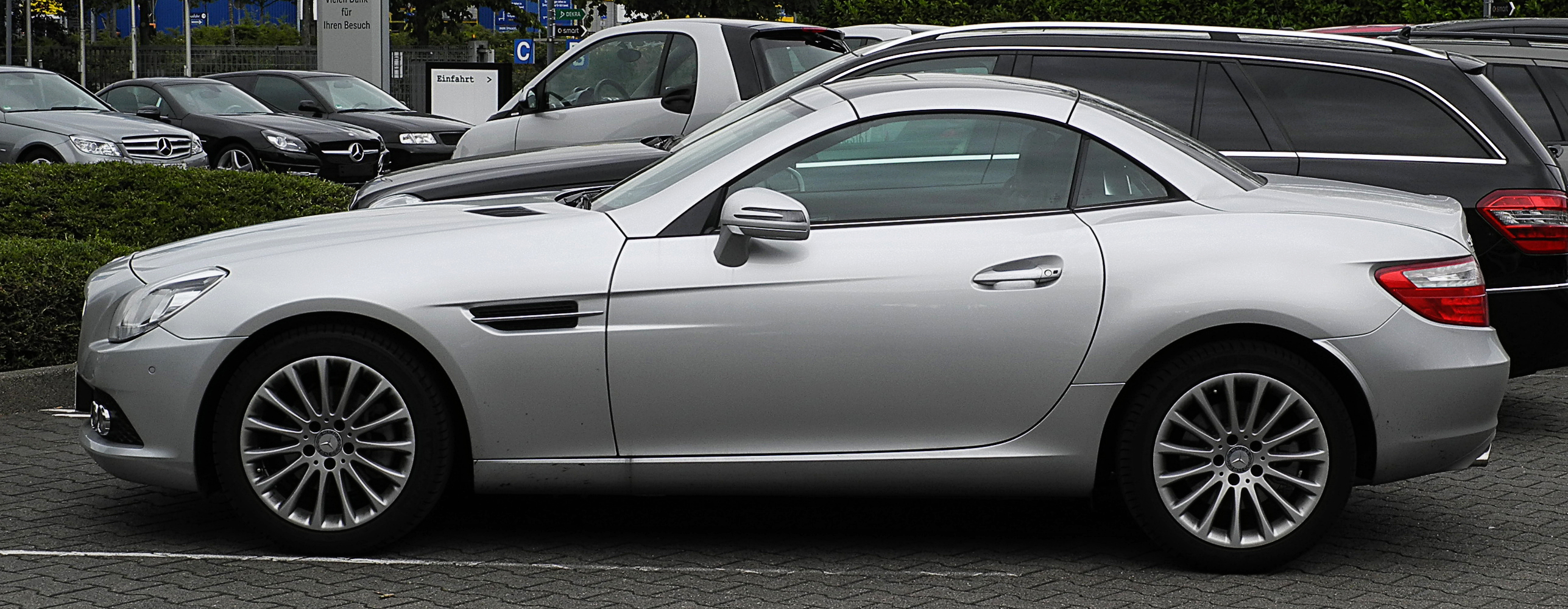 Mercedes-Benz SLK 200 BlueEFFICIENCY (R 172)